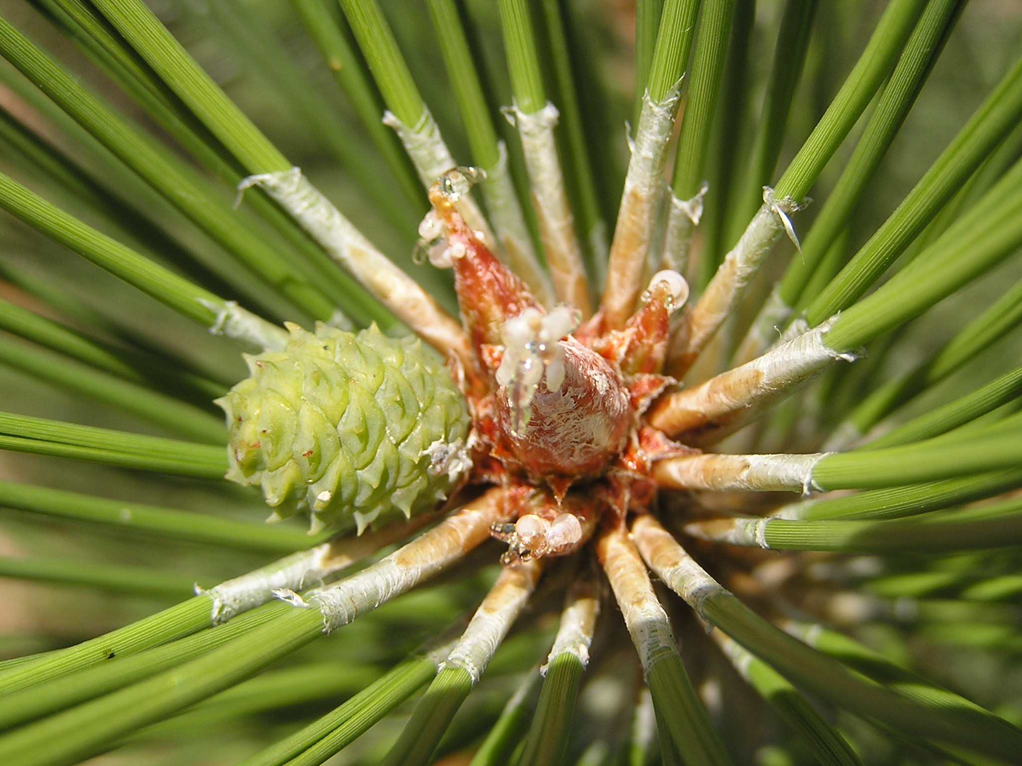 Растение в Седово.